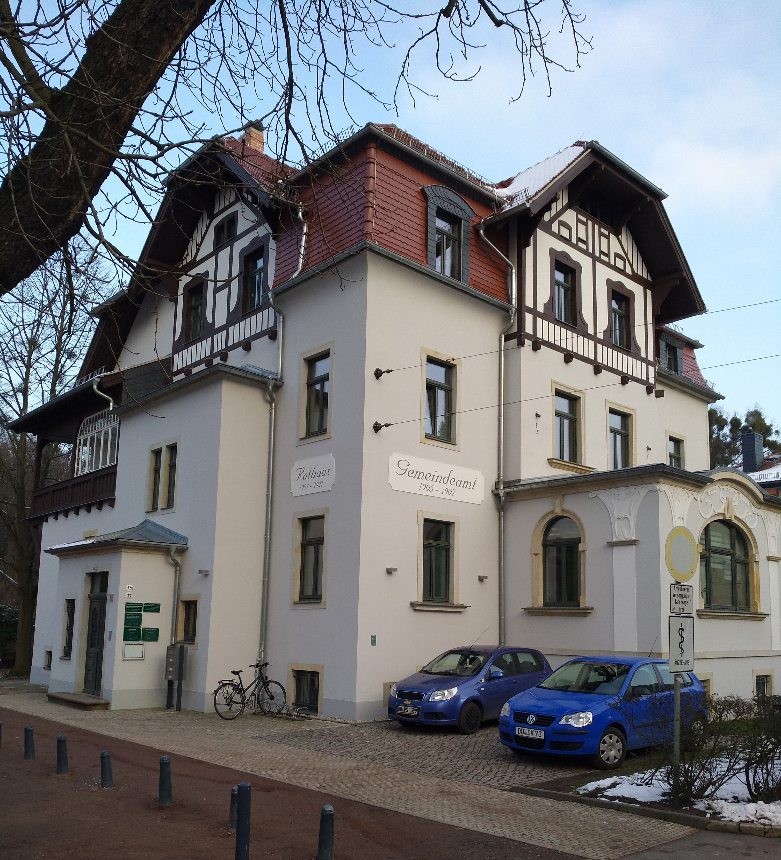 Ehemaliges Rathaus der Gemeinde Weißer Hirsch, Stand Februar 2018